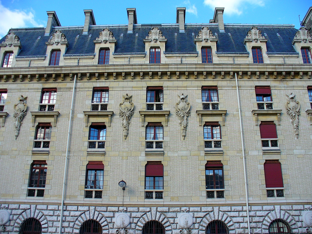 Caserne de la Garde républicaine, bd Henri IV à Paris (à côté de la bibliothèque de l'Arsenal)